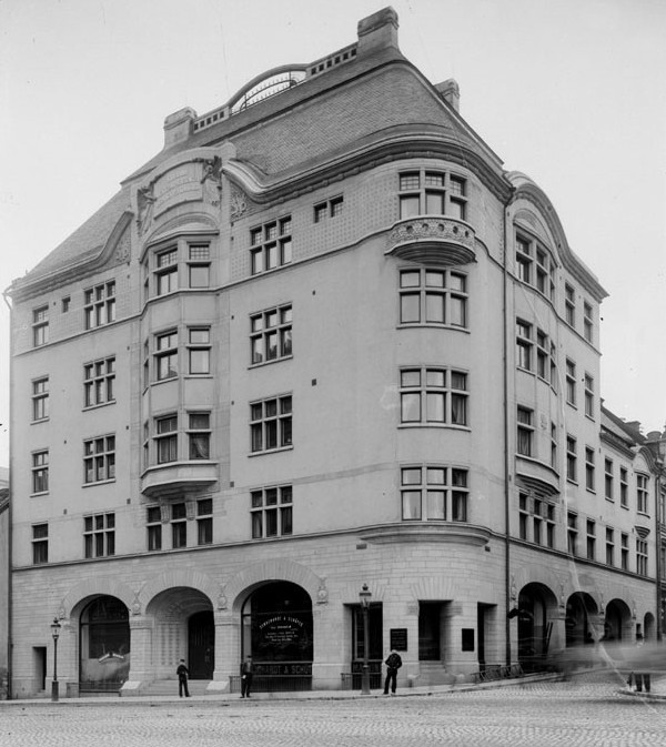 Vasagatan 24. SWB:s hus. Arkitekt Erik Lallerstedt. Byggnadsår 1902—03 . Byggherre: Stockholm–Västerås–Bergslagens Trafikaktiebolags Pensions samt Enke- och Pupillkassa. Byggmästare Fredrik Dahl